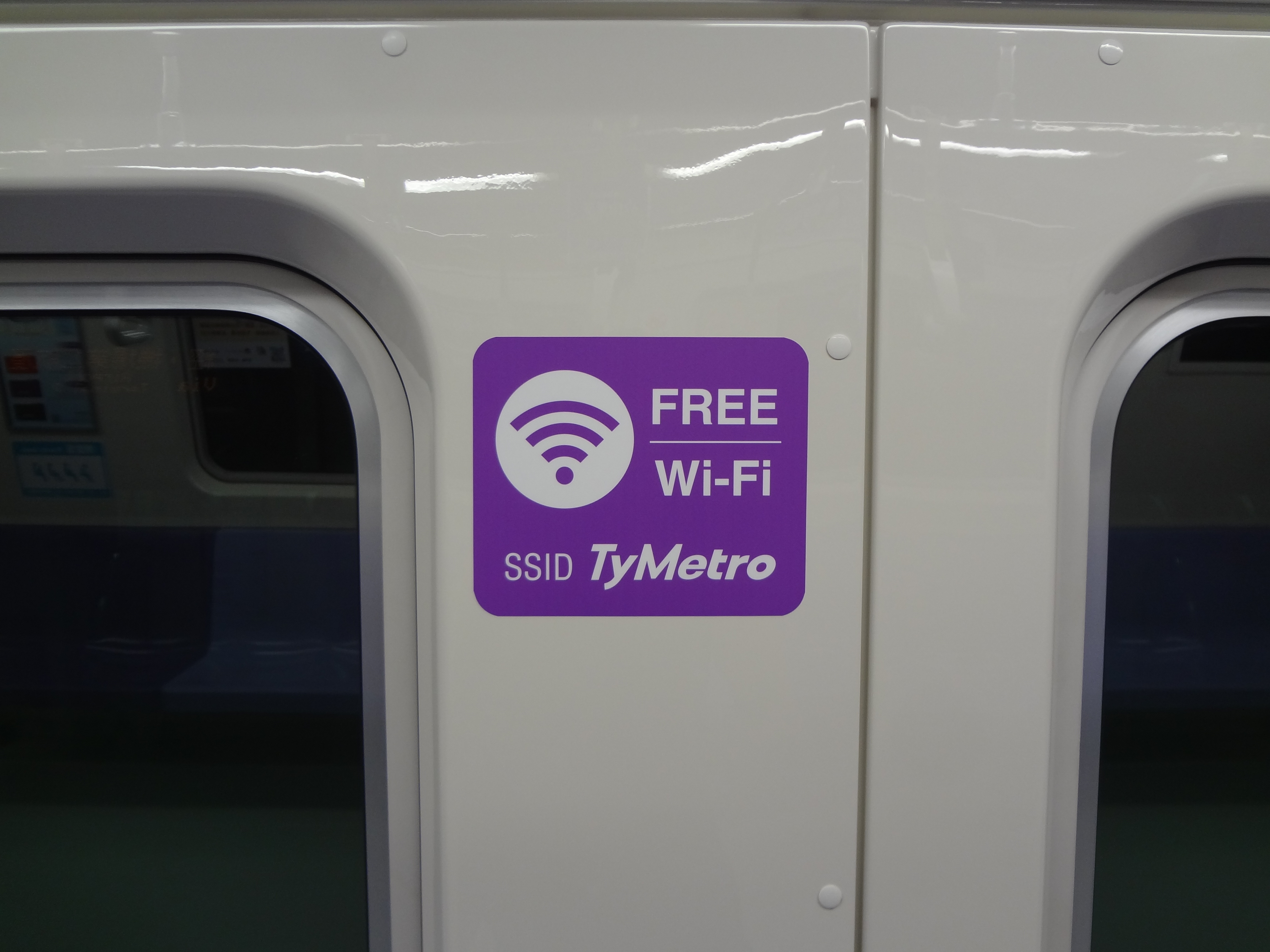 桃園捷運普通車1409車廂內，桃園捷運免費Wi-Fi標誌貼紙。